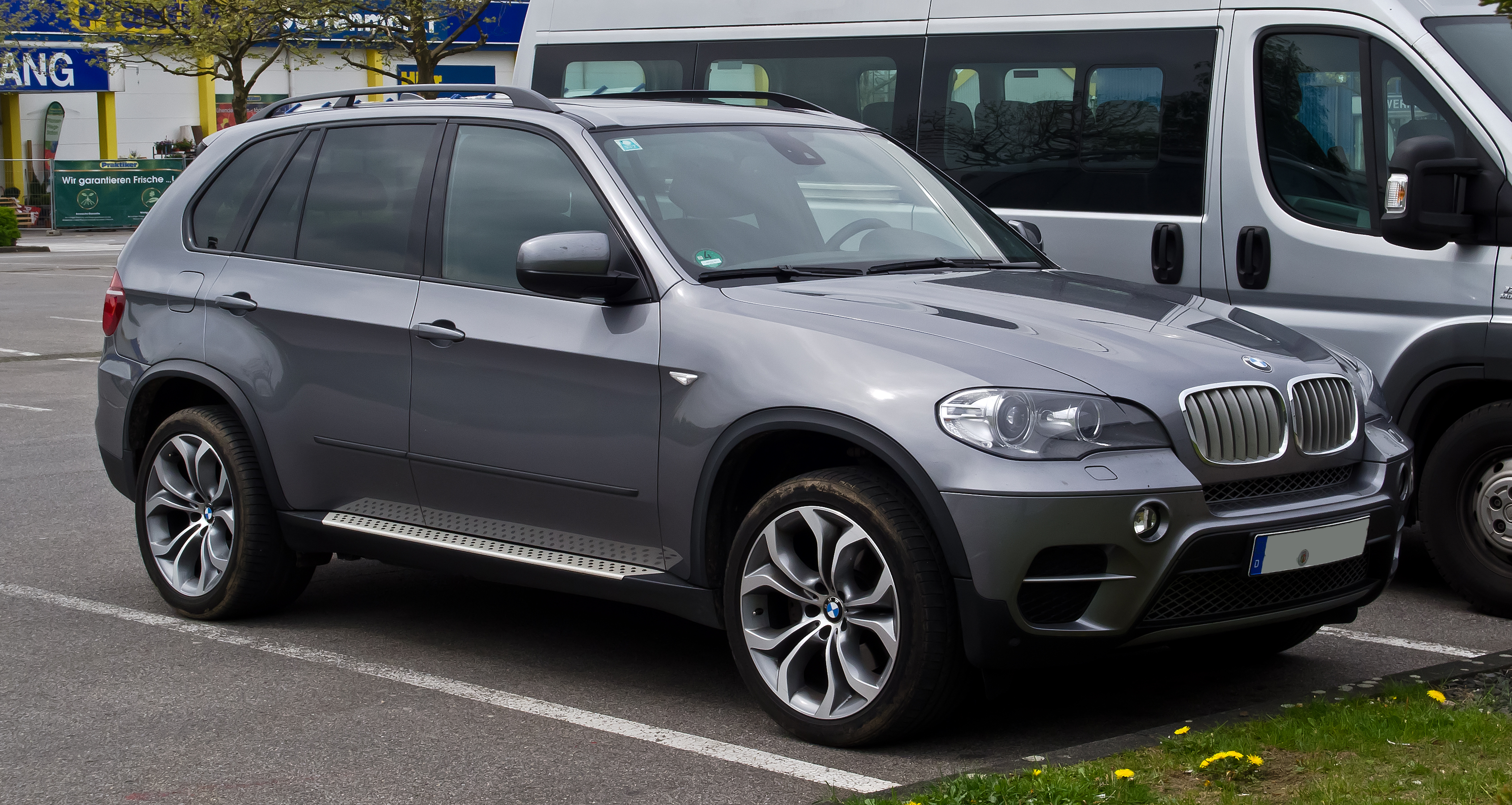 BMW X5 (E70, Facelift)